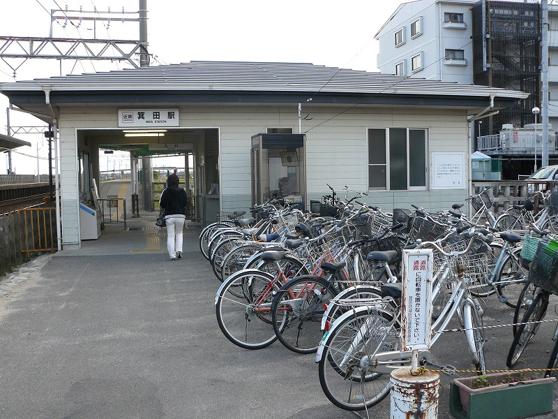 近鉄ja:名古屋線ja:箕田駅 2007年05月19日 投稿者により撮影 category:鉄道駅画像